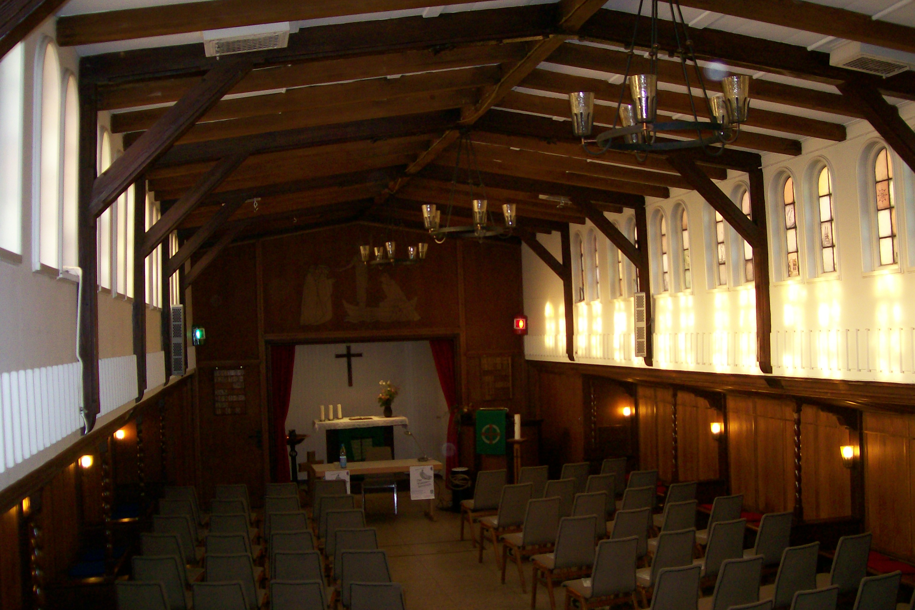 Flussschifferkirche in Hamburg in einem Weserleichter von 1906, Innenaufnahme